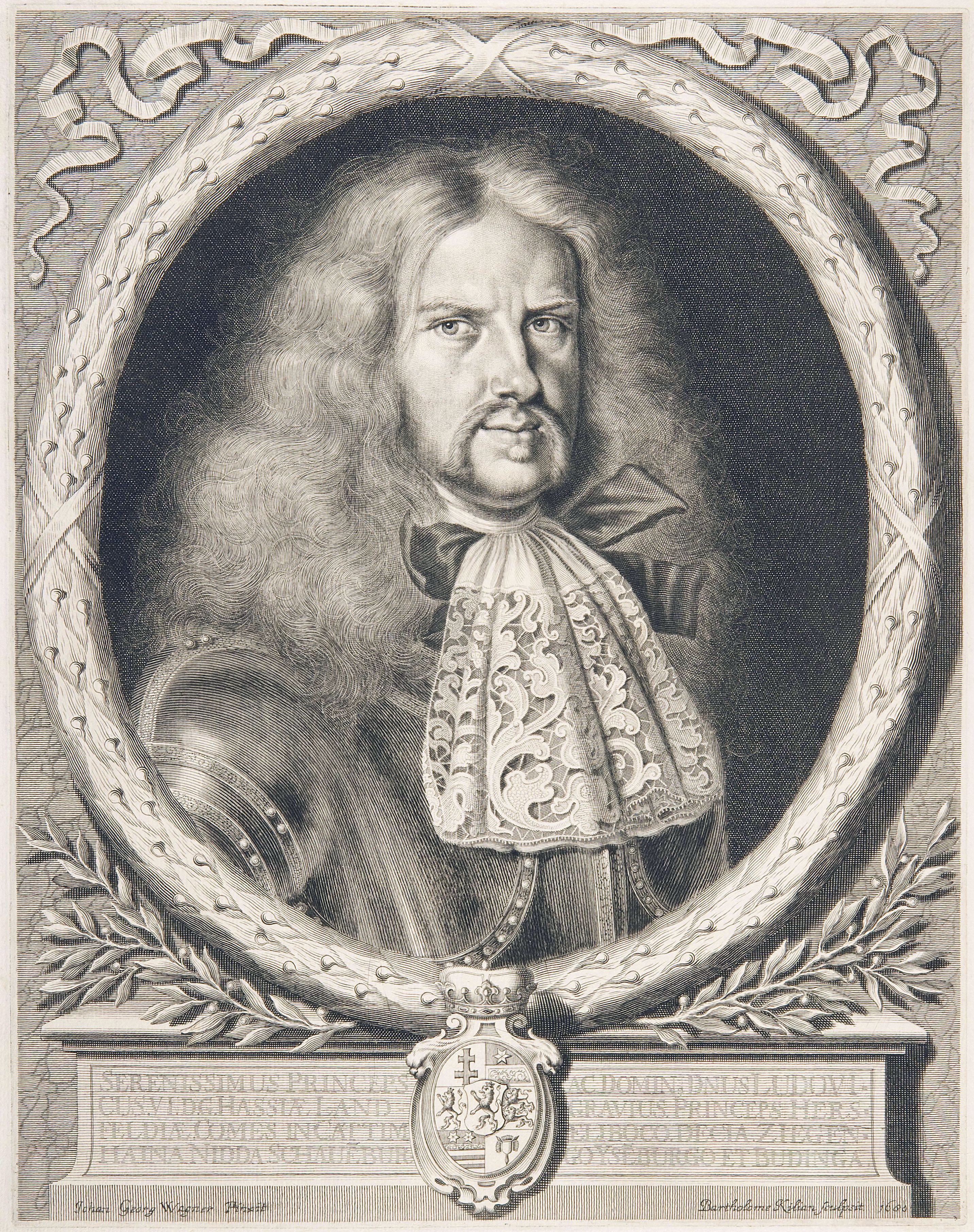 Ludwig VI. (1630–1678), Landgraf von Hessen-Darmstadt 1661–1678